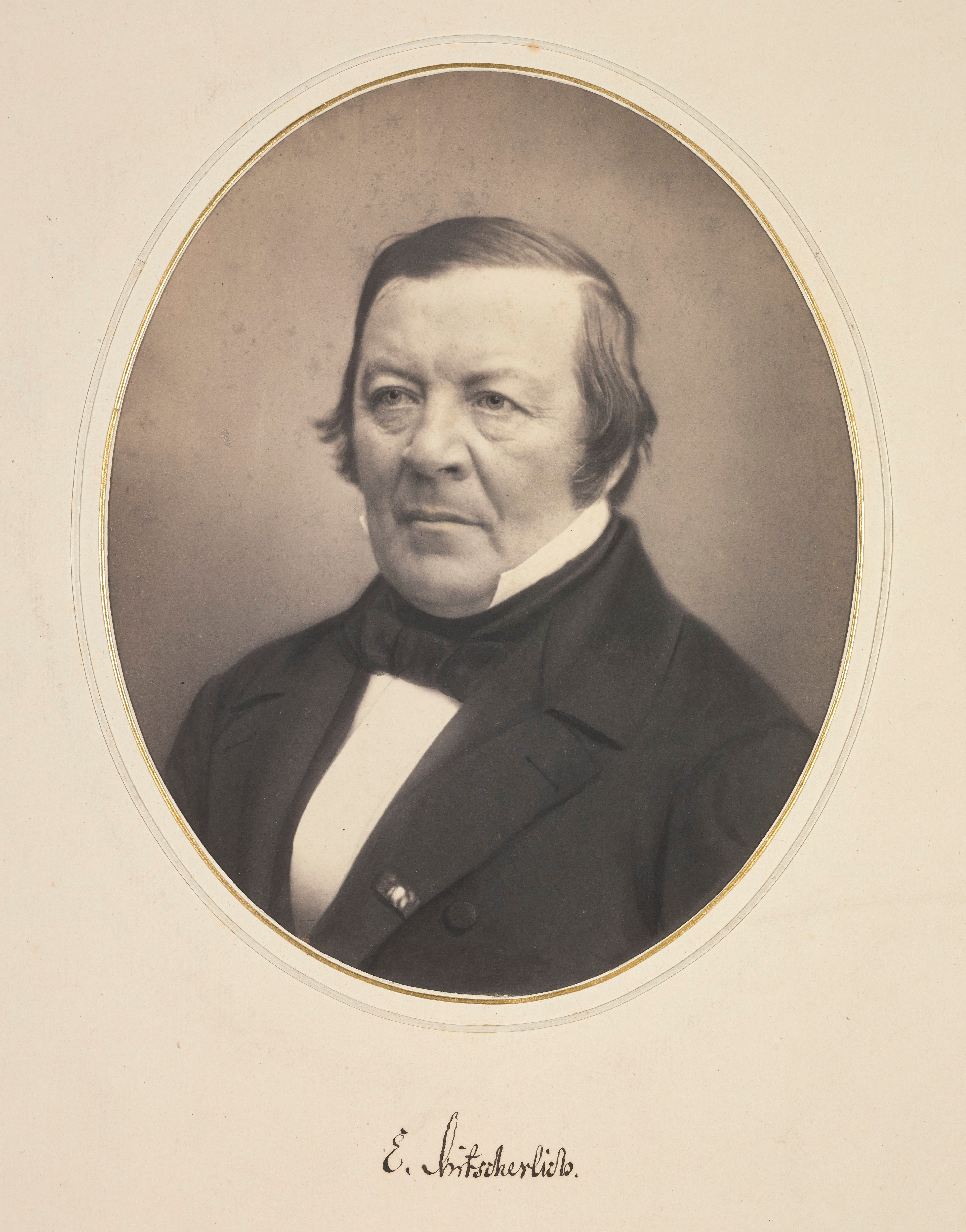 Eilhard Mitscherlich